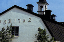 Taqbaylit: Tallirakennus